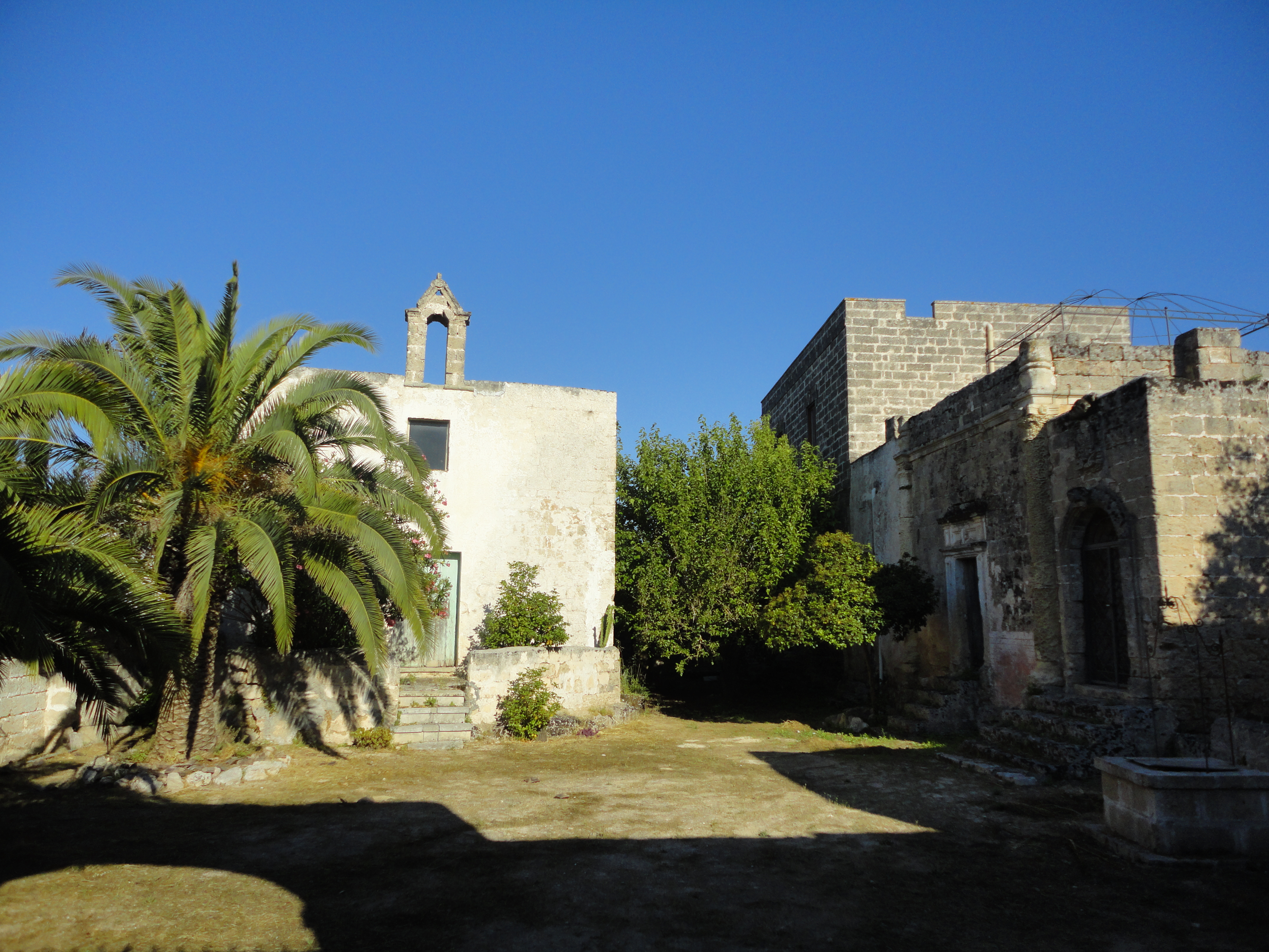 Abbazia di San Nicola di Pergoleto Galatone, Lecce